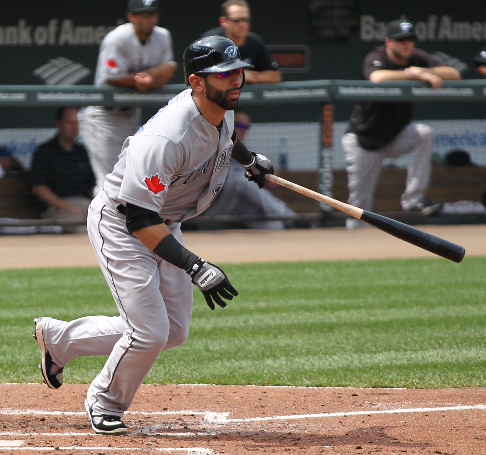 José Bautista